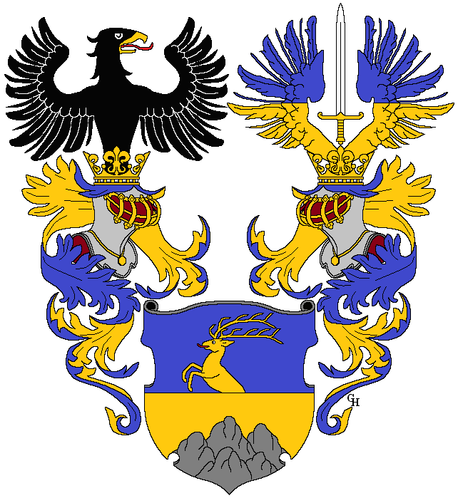 Wappen des k.u.k. Offiziers und Mediziners Dr. Joseph Kerzl (1841–1919), Leibarzt des Kaisers Franz Joseph I., verliehen 1915 anlässlich seiner Erhebung in den österreichischen Ritterstand. Zeichnung von Gerd Hruška ( Für weitere Informationen zu dieser Standeserhebung siehe (